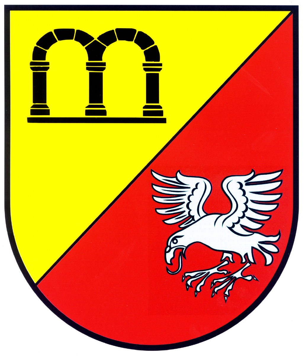 Der vordere Schildteil verweist durch die Gebäudeteile symbolisierenden schwarzen Arkaden auf die reichhaltige sakrale und profane architektonische Ausstattung des Bades in römischer Zeit (Tempel, Thermengebäude) und im Mittelalter (alte Kapelle an der Stelle der heutigen katholischen Kirche, bei deren Bau Spolien aus dem antiken Thermengebäude verwendet worden waren); der Bau wurde 1868 durch die Berliner Baudeputation mit Anregungen Friedrich Wilhelms IV. ausgeführt. Der silberne Falke im hinteren Schildteil erinnert an den Berg „Falkenlay“ in der Gemarkung von Kennfus und integriert somit auch diesen Ortsteil in das Wappen.